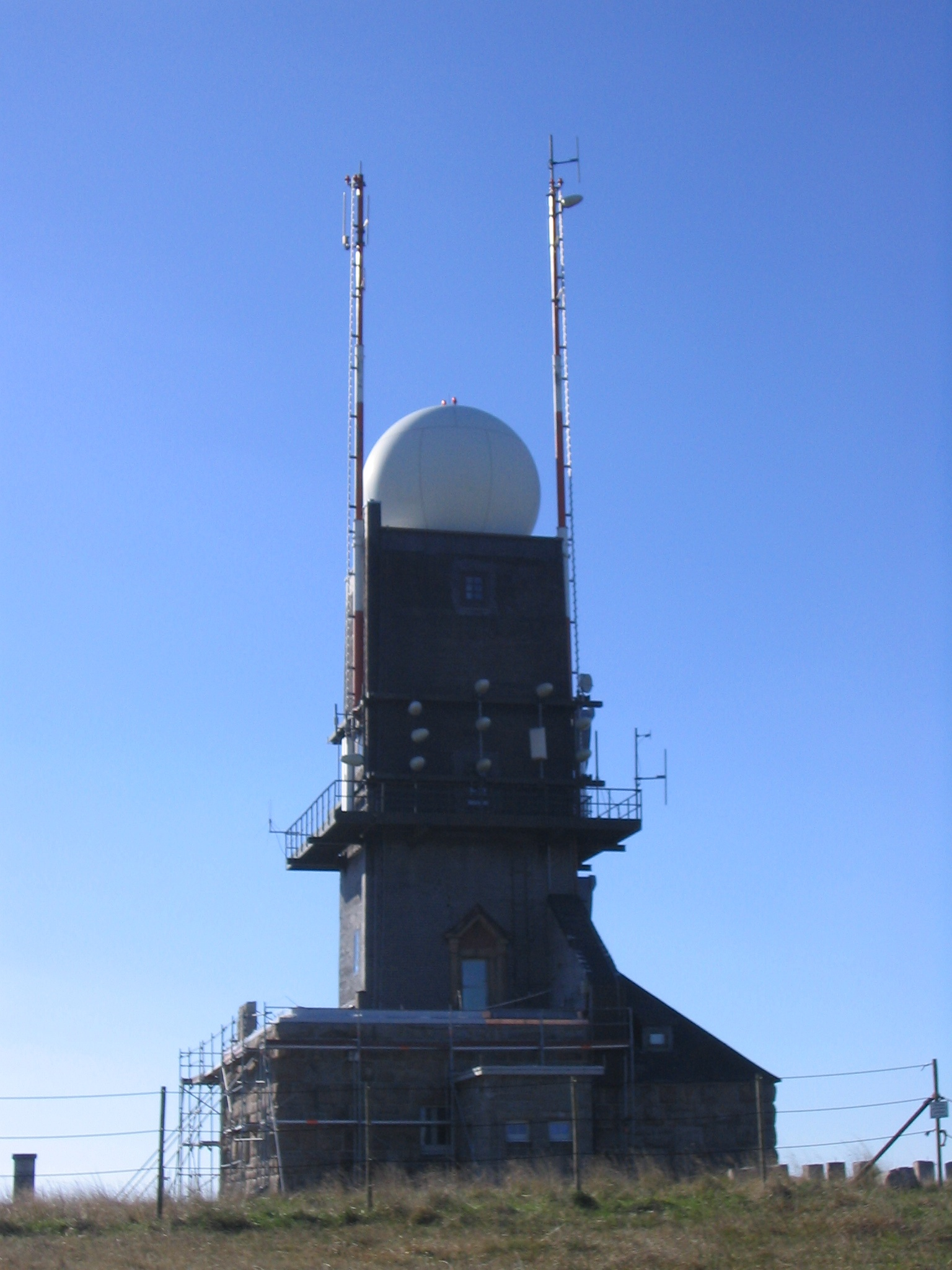 Wetterradarstation auf dem Feldberg. Beschreibungstafel